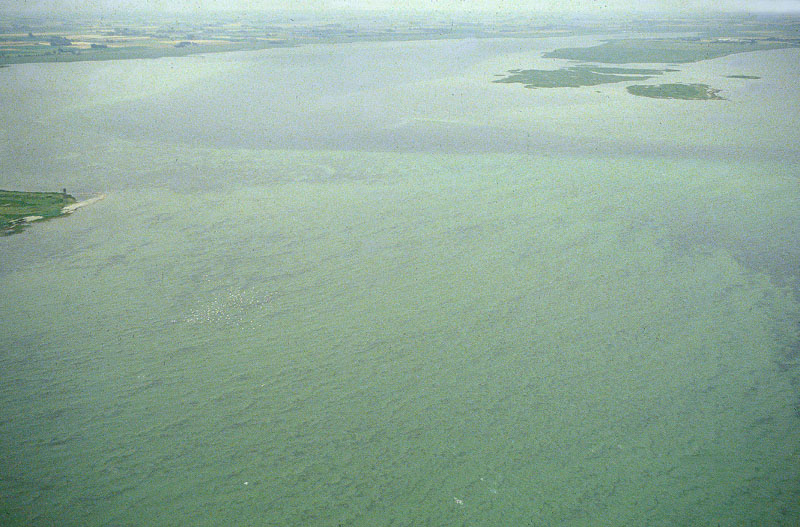 The viking harbour of Foteviken, Skania, Sweden.